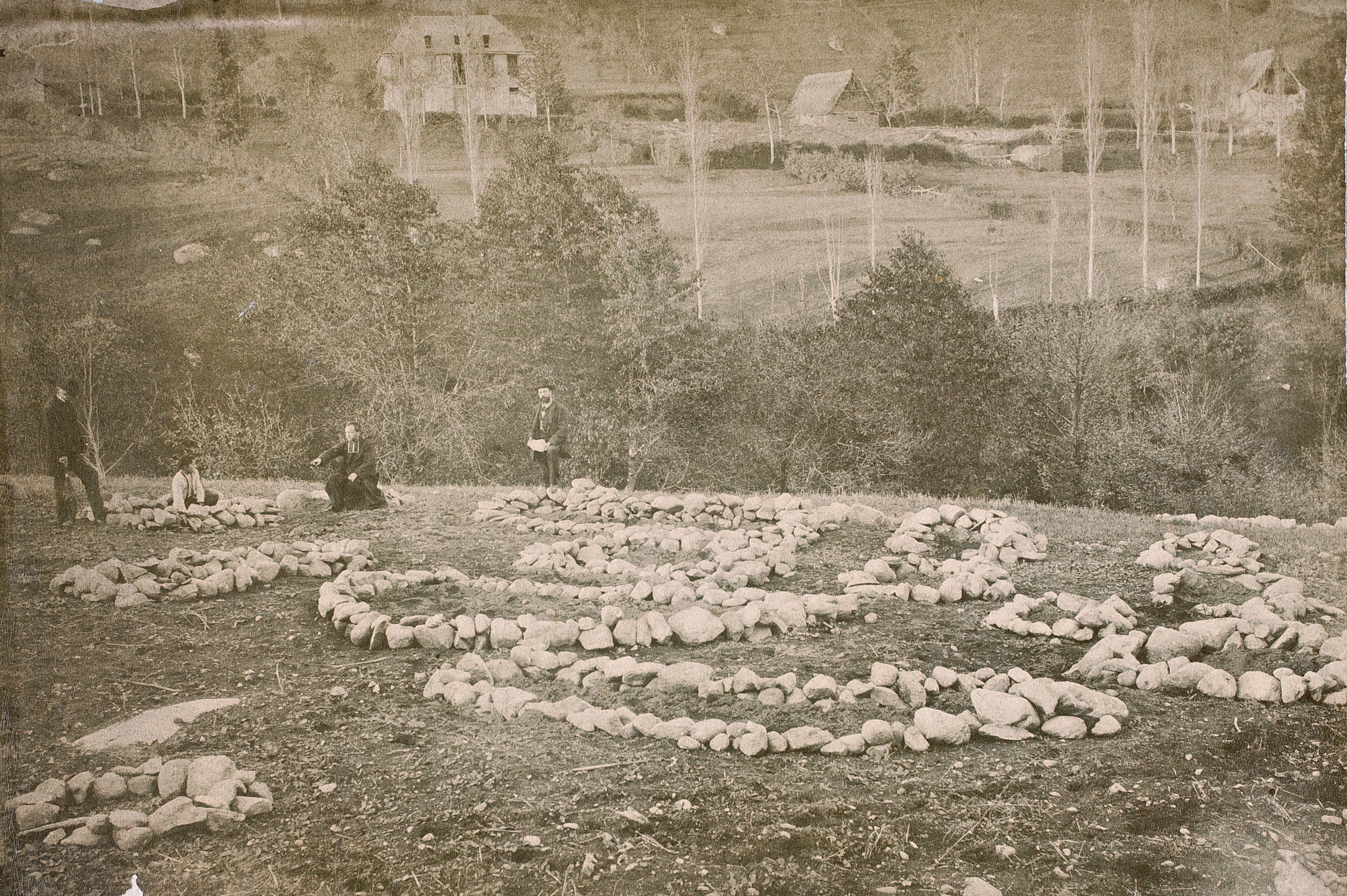 Fouilles de la nécropole proto-historique à incinérations et cercles de pierre menées en 1886 à Ayer, commune de Bordes-sur-Lez (Ariège)